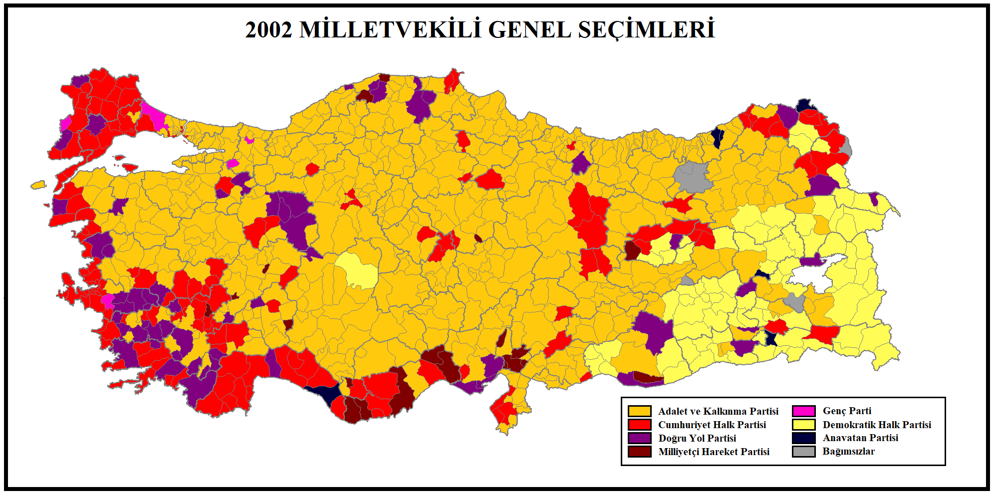 2002 genel seçimleri sonucunun Türkiye ilçeler haritasında gösterimi.